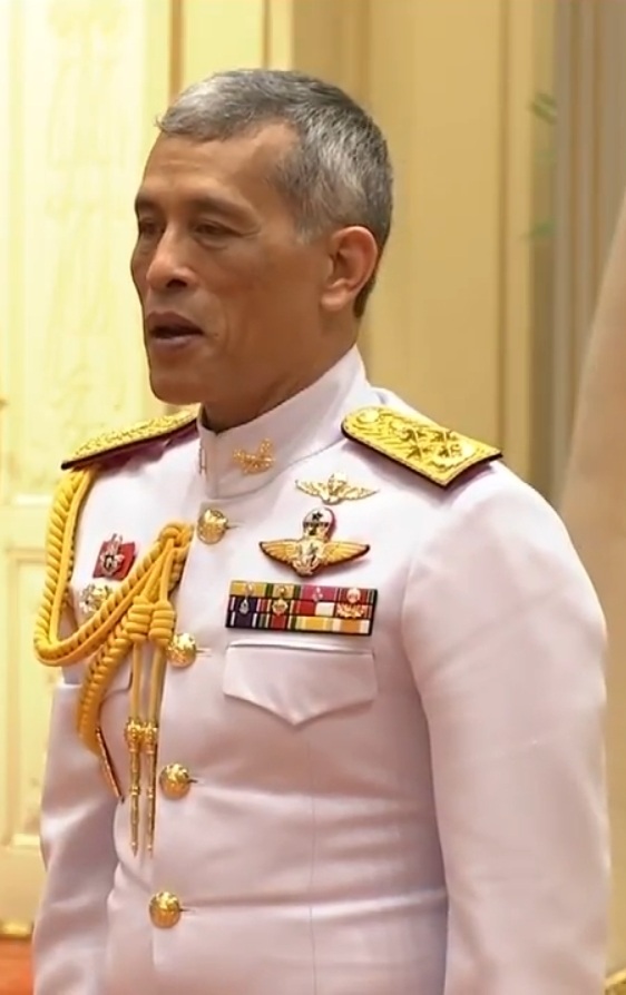 สมเด็จพระเจ้าอยู่หัว พระราชทานพระราชวโรกาสให้คณะบุคคลเฝ้าทูลละอองธุลีพระบาท ณ พระที่นั่งอัมพรสถาน พระราชวังดุสิต